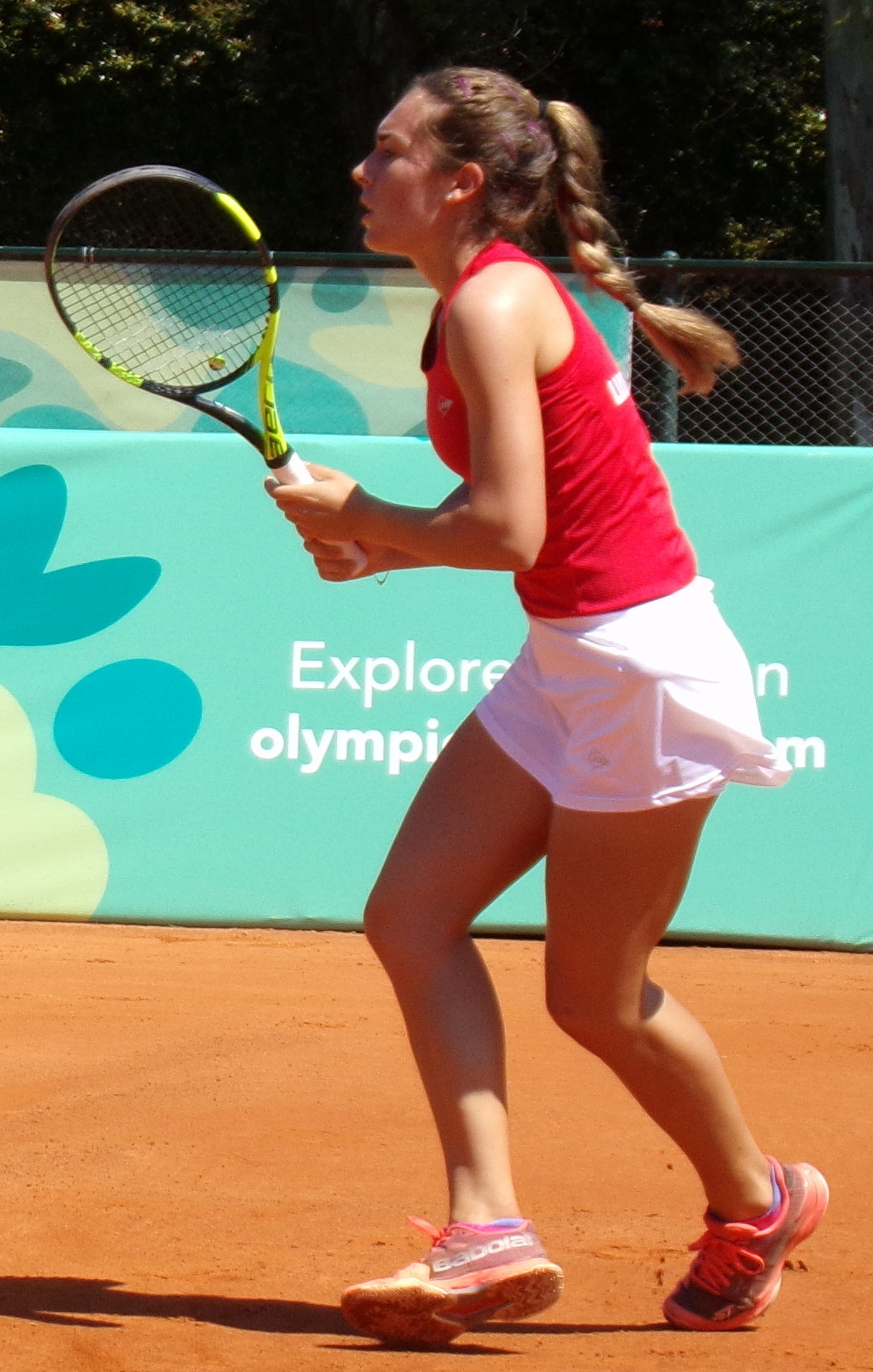 JJOO de la Juventud Buenos Aires 2018